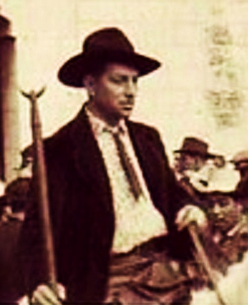 Joseph d'Arbaud aux Saintes-Maries-de-la-Mer